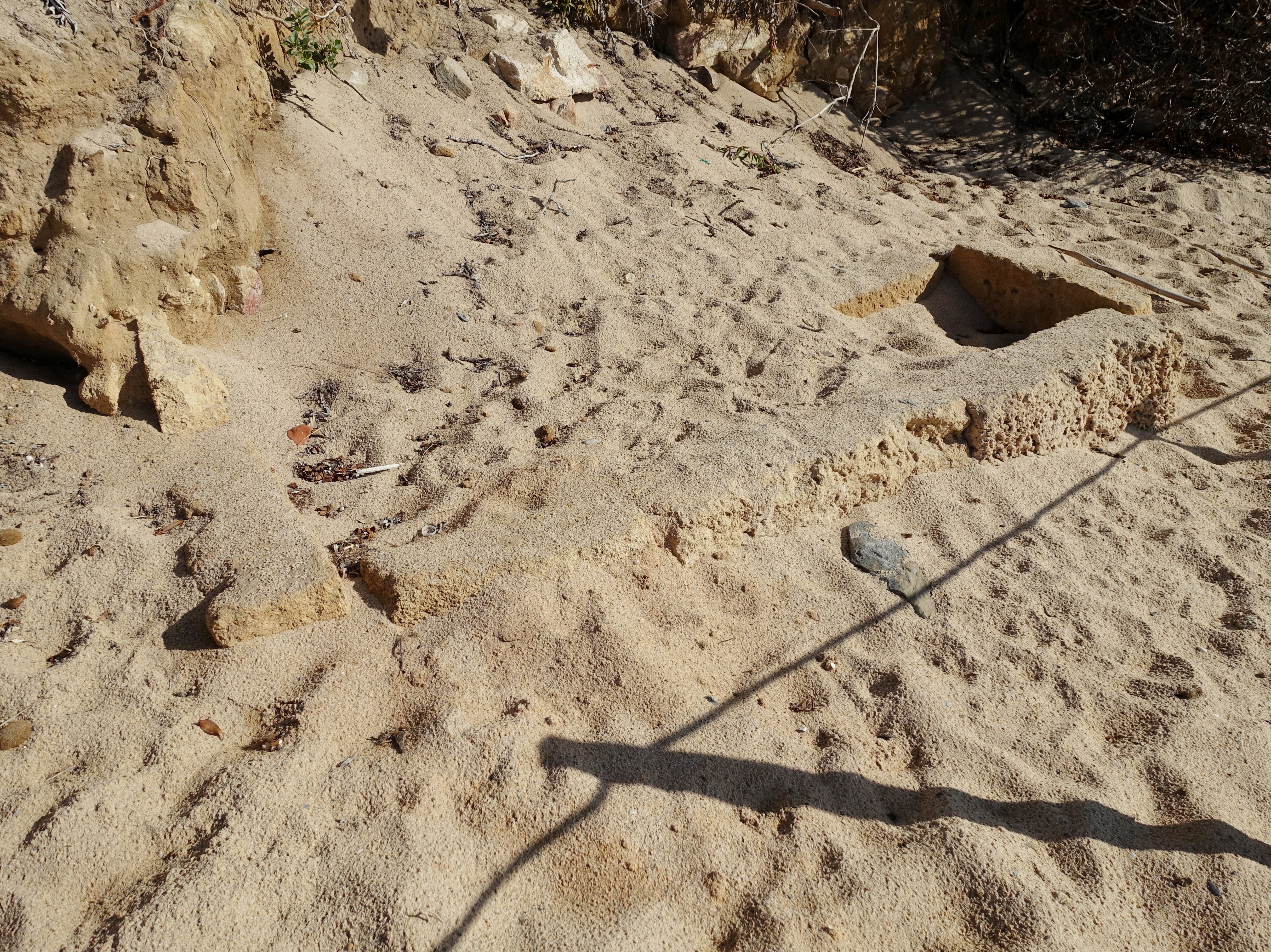 Mauerreste am Strand Sa Colonia (Spiaggia della Colonia), Gemeinde Domus de Maria, Sardinien, Italien